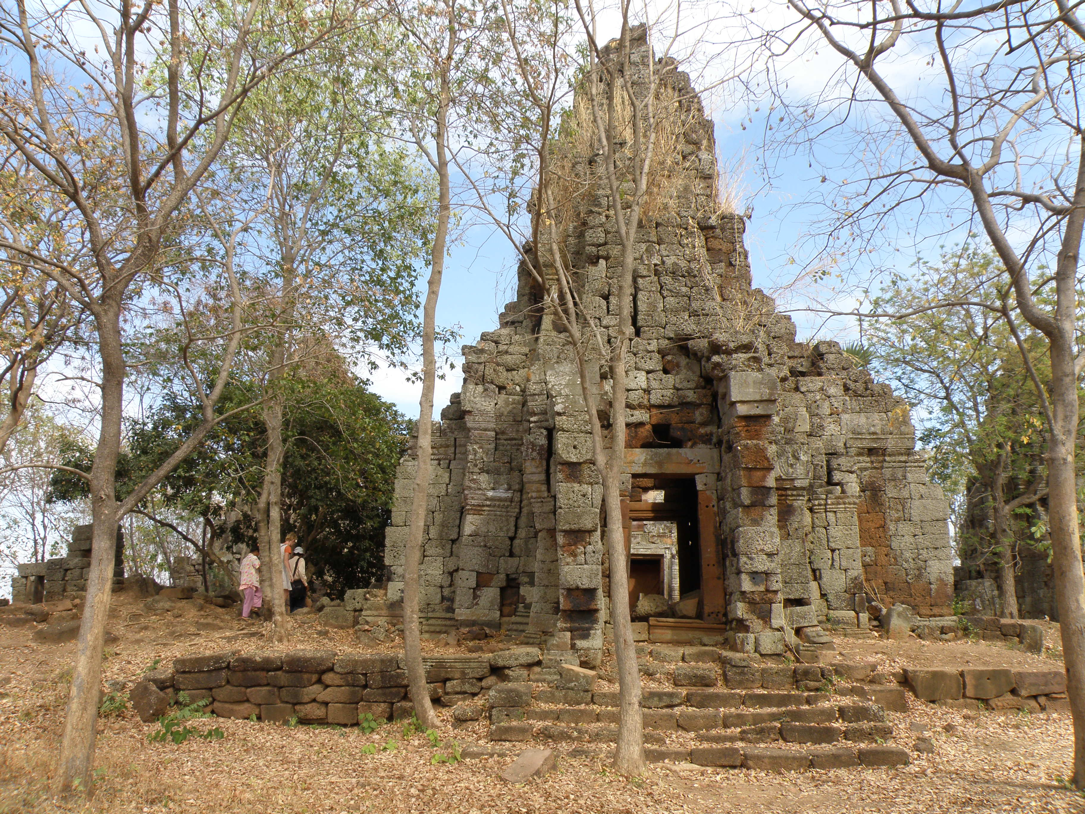 Cambodge - Battambang - Vat Banon - Le site